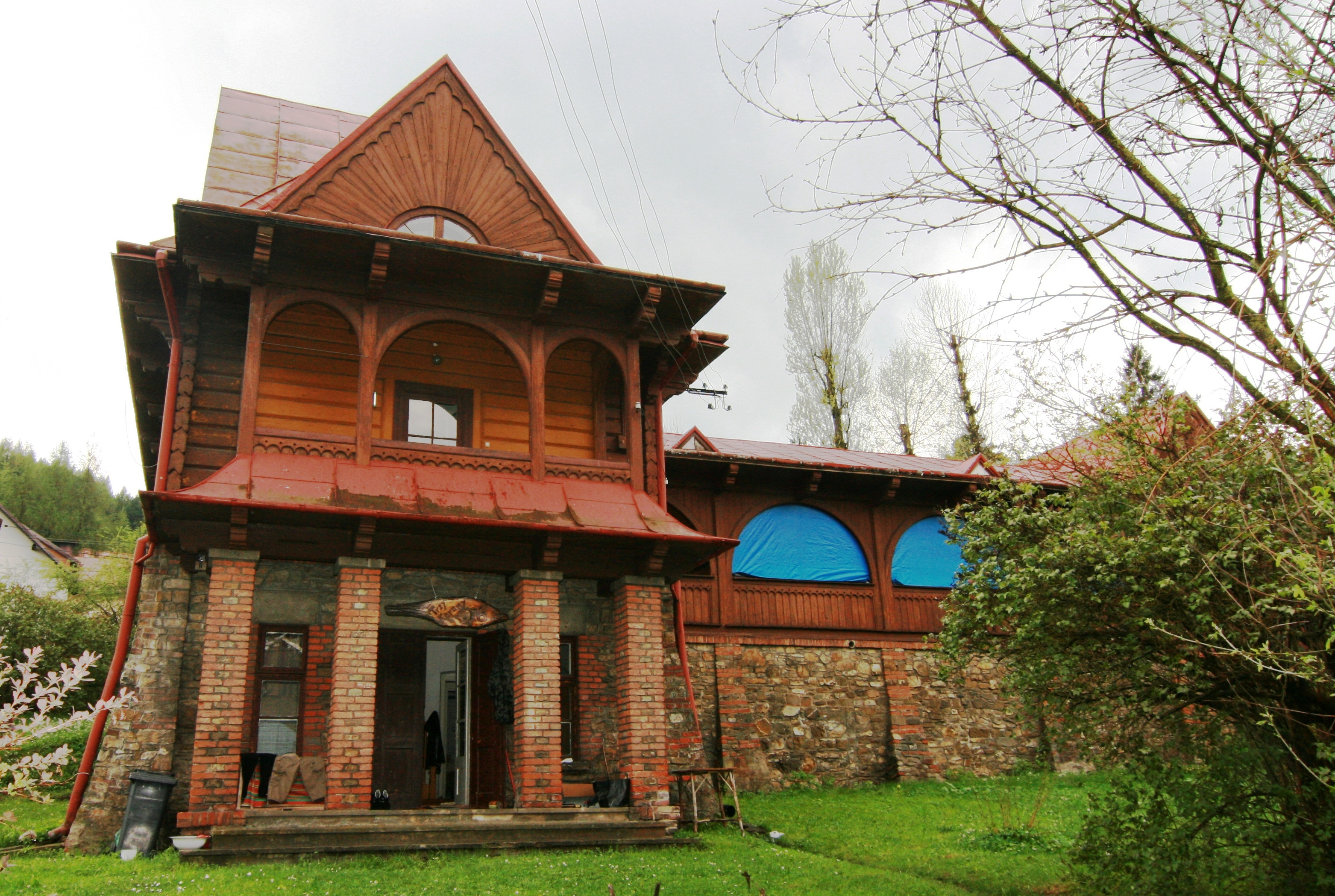 Dwór Dziewolskich w Krościenku nad Dunajcem. Obecnie siedziba nadleśnictwa